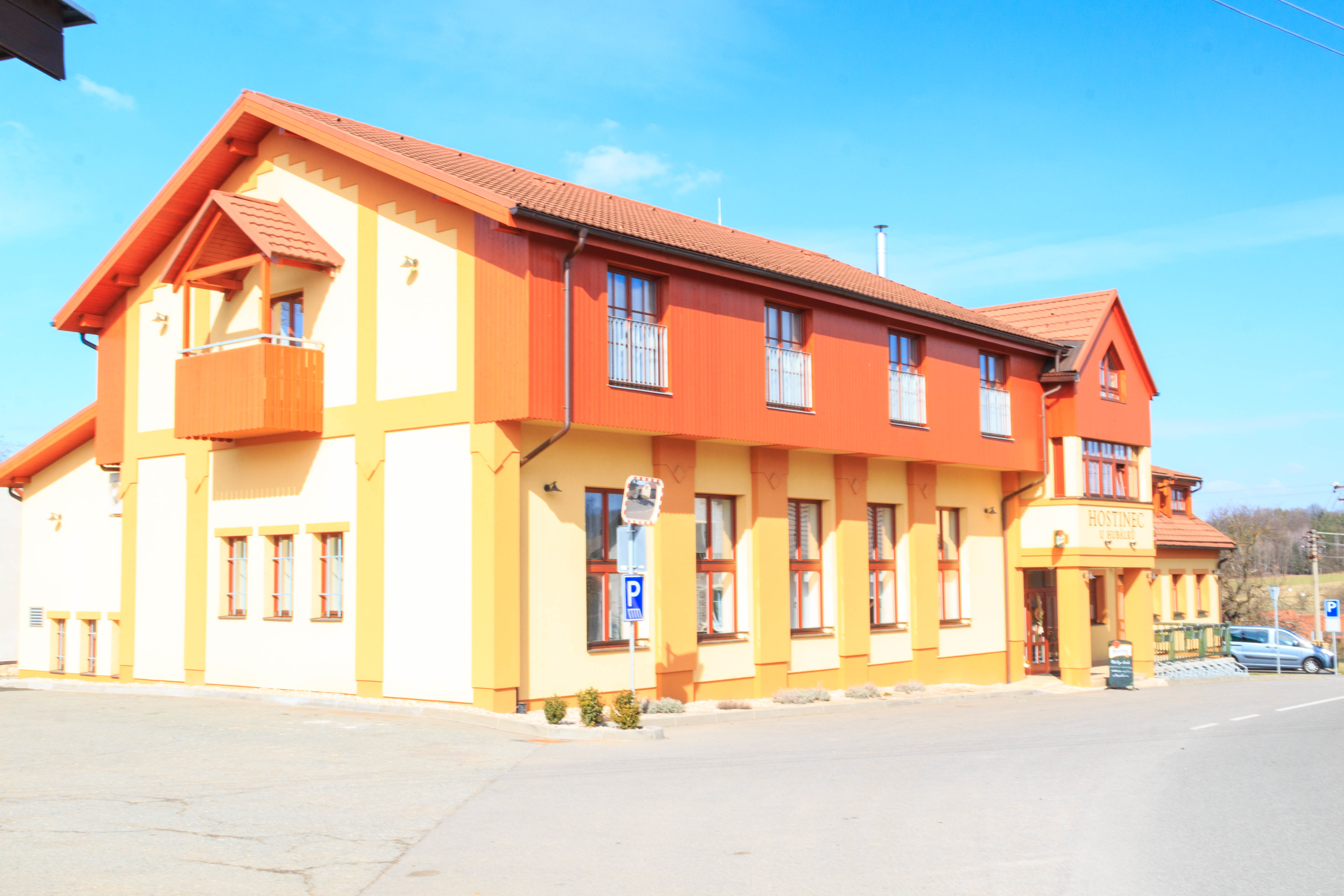 Kostelecká Lhota - hospoda